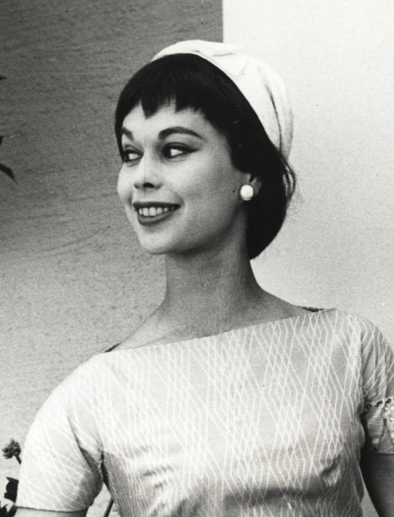 Nordiska Kompaniet visar dammode i samband med utställningen H55 i Helsingborg. Modellen Gunilla Pontén är klädd i klänning av cerisefärgad, mönstervävd bomull från Stobo skapad av Göta Trägårdh. Ämnesord: Kläder, Kvinna, Mode.